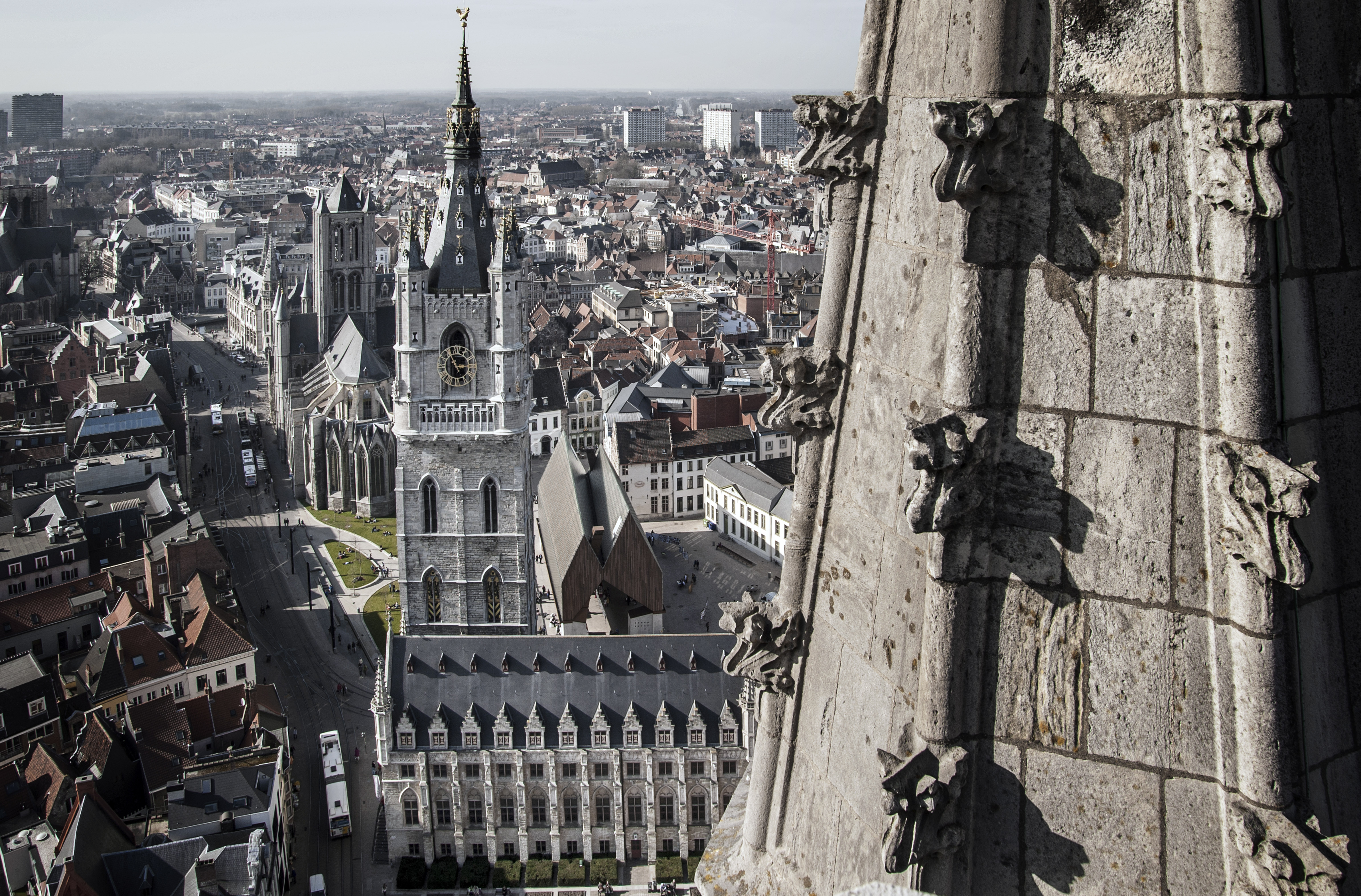 Zicht op Gent vanop de Sint-Baafs-kathedraal, (midden) het Belfort, (rechts) de Stadshal en (links) Sint-Niklaaskerk.